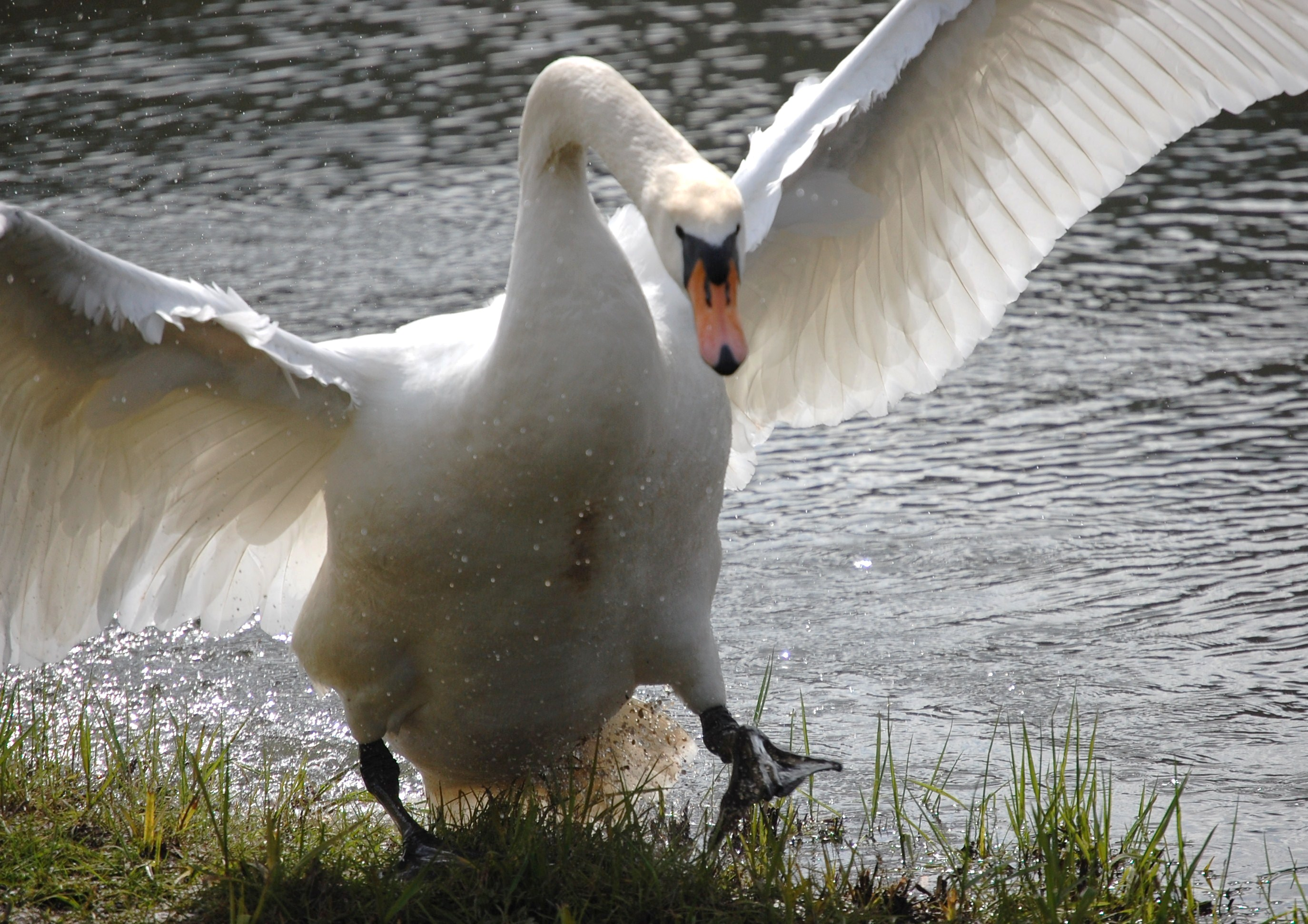 Höckerschwan-Männchen startet zum Angriff